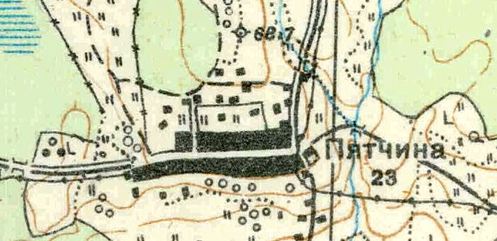 Топографическая карта Ленинградской области, квадрат О-35-10-В-г (Бол. Стремление), деревня Пятчино.